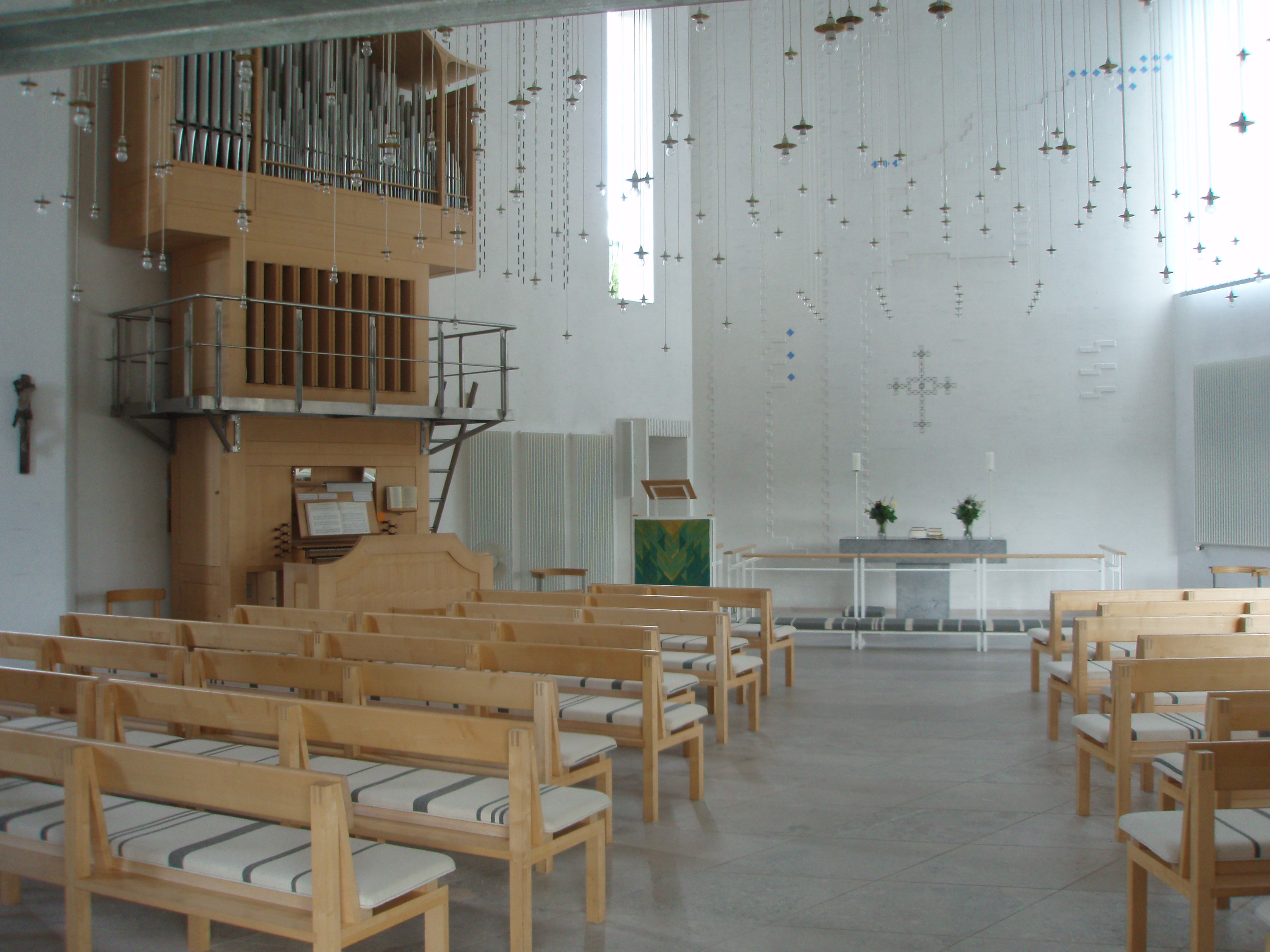 Kirken kaldes Lysets kirke.